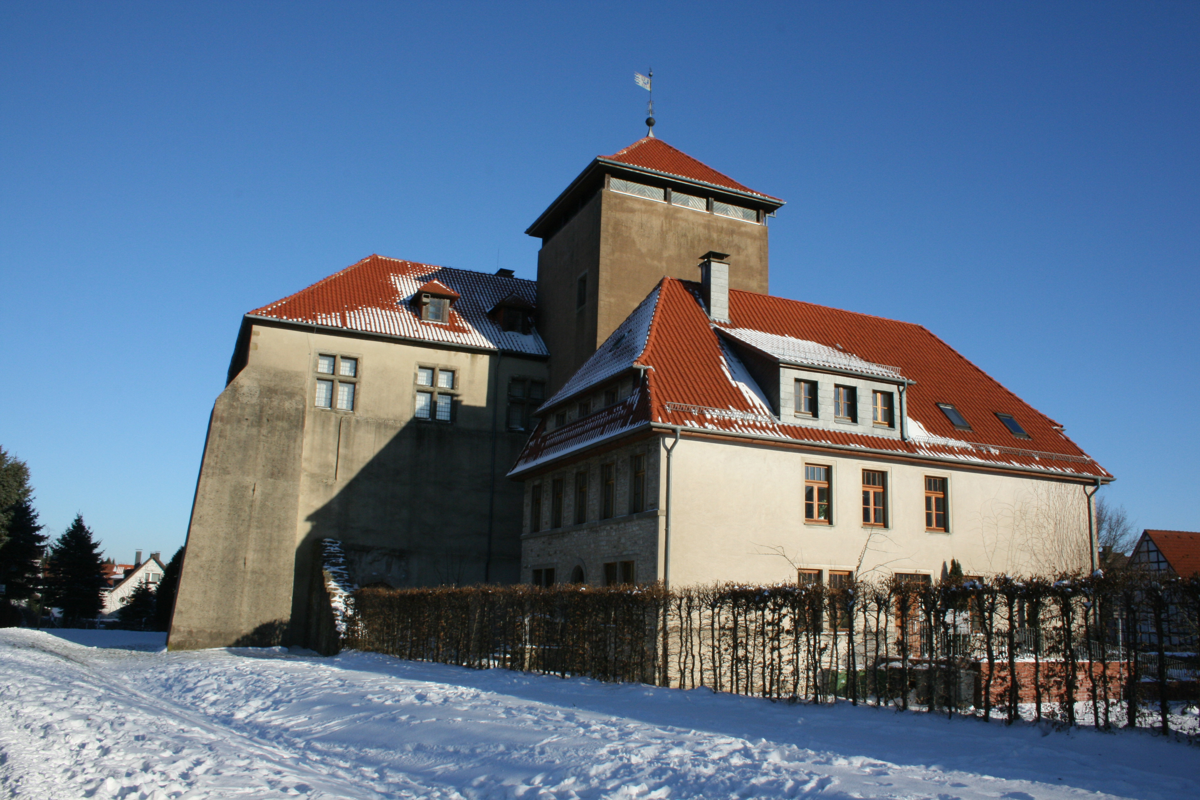 Burg Horn in Horn-Bad Meinberg, Rückseite